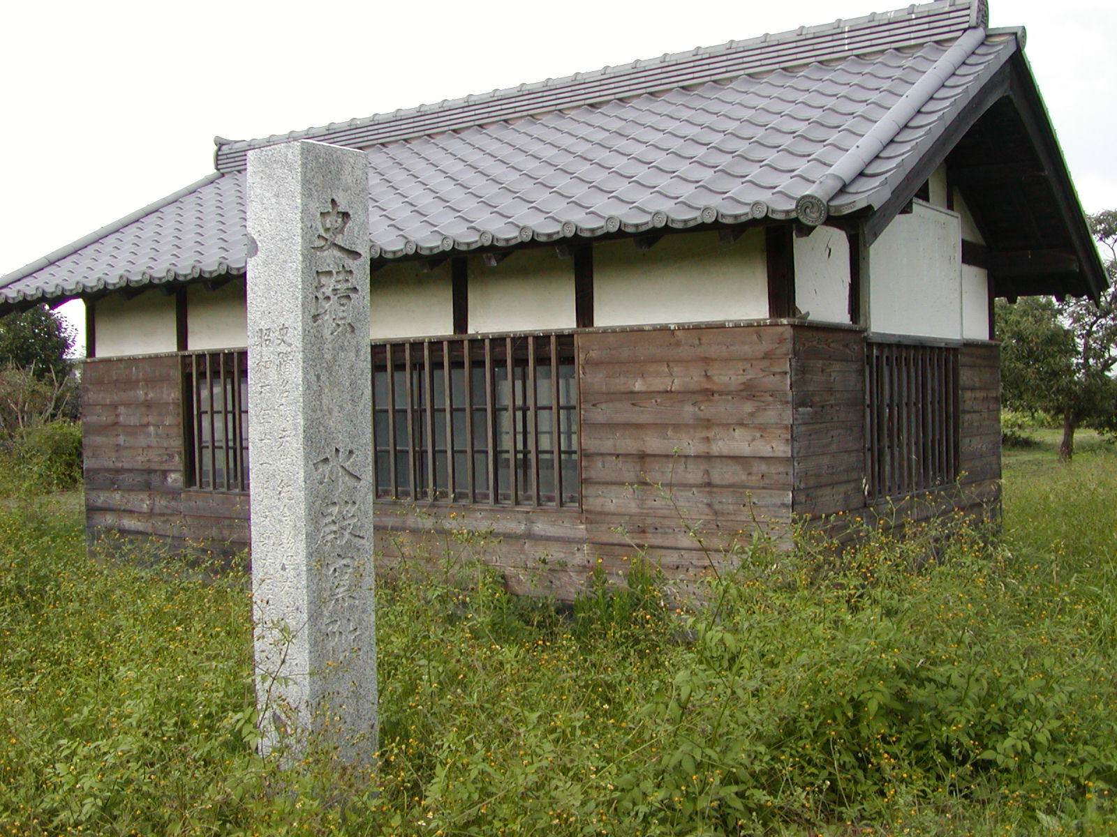 水殿瓦窯跡